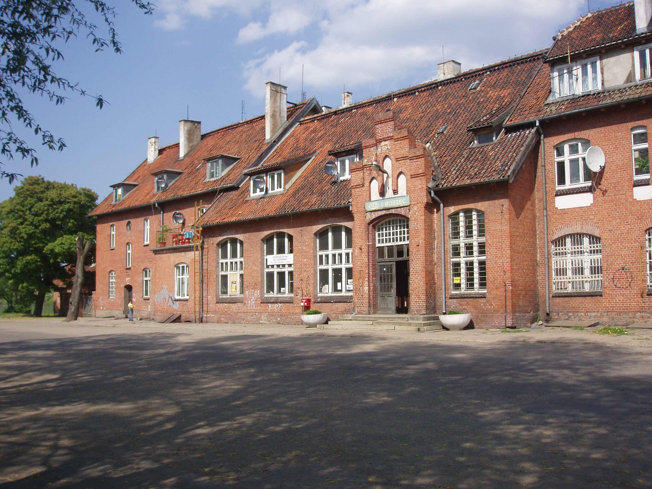 Orneta - budynek stacji kolejowej, rok 2006